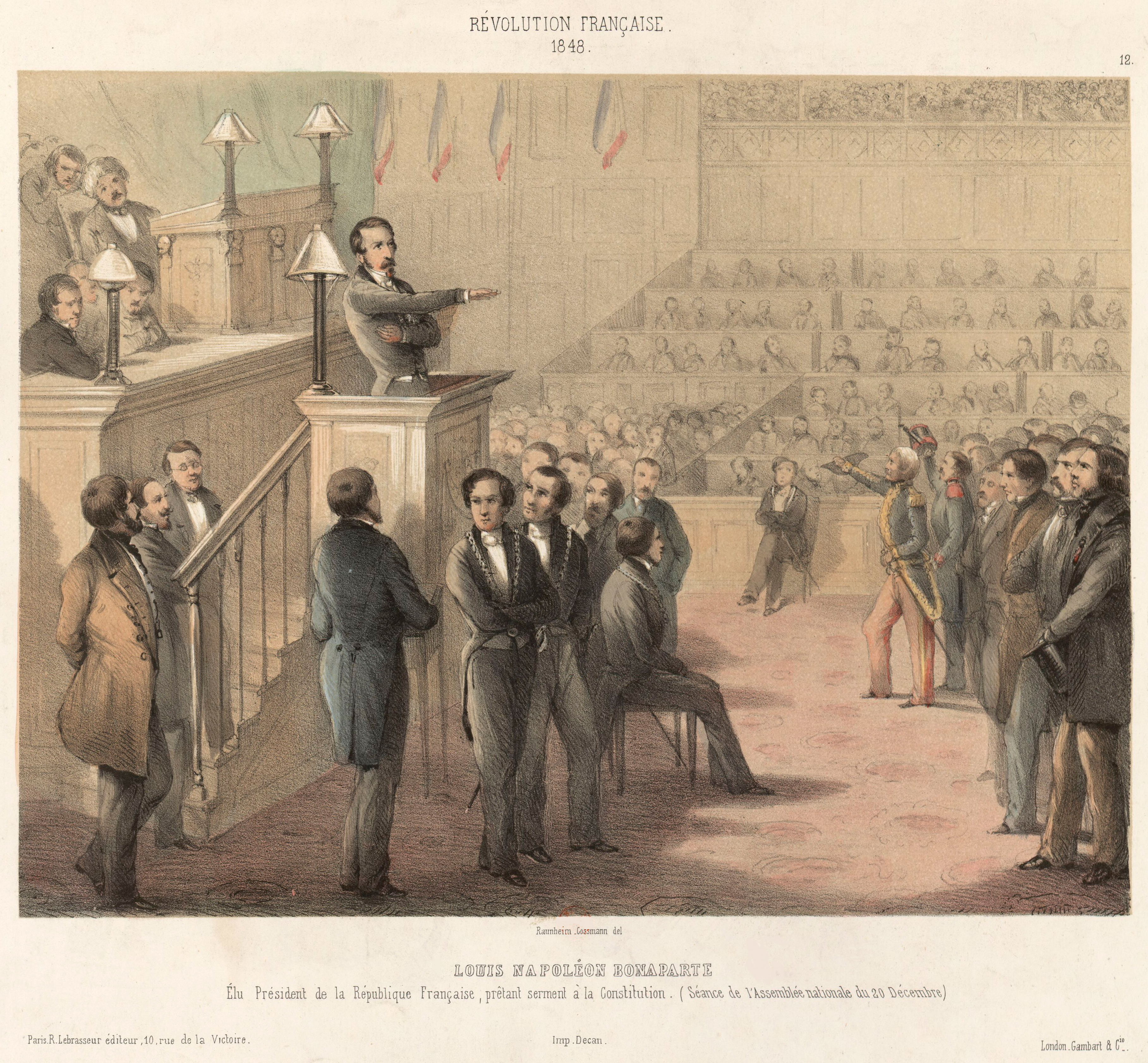 Louis Napoléon Bonaparte élu Président de la République française, prêtant serment à la Constitution.